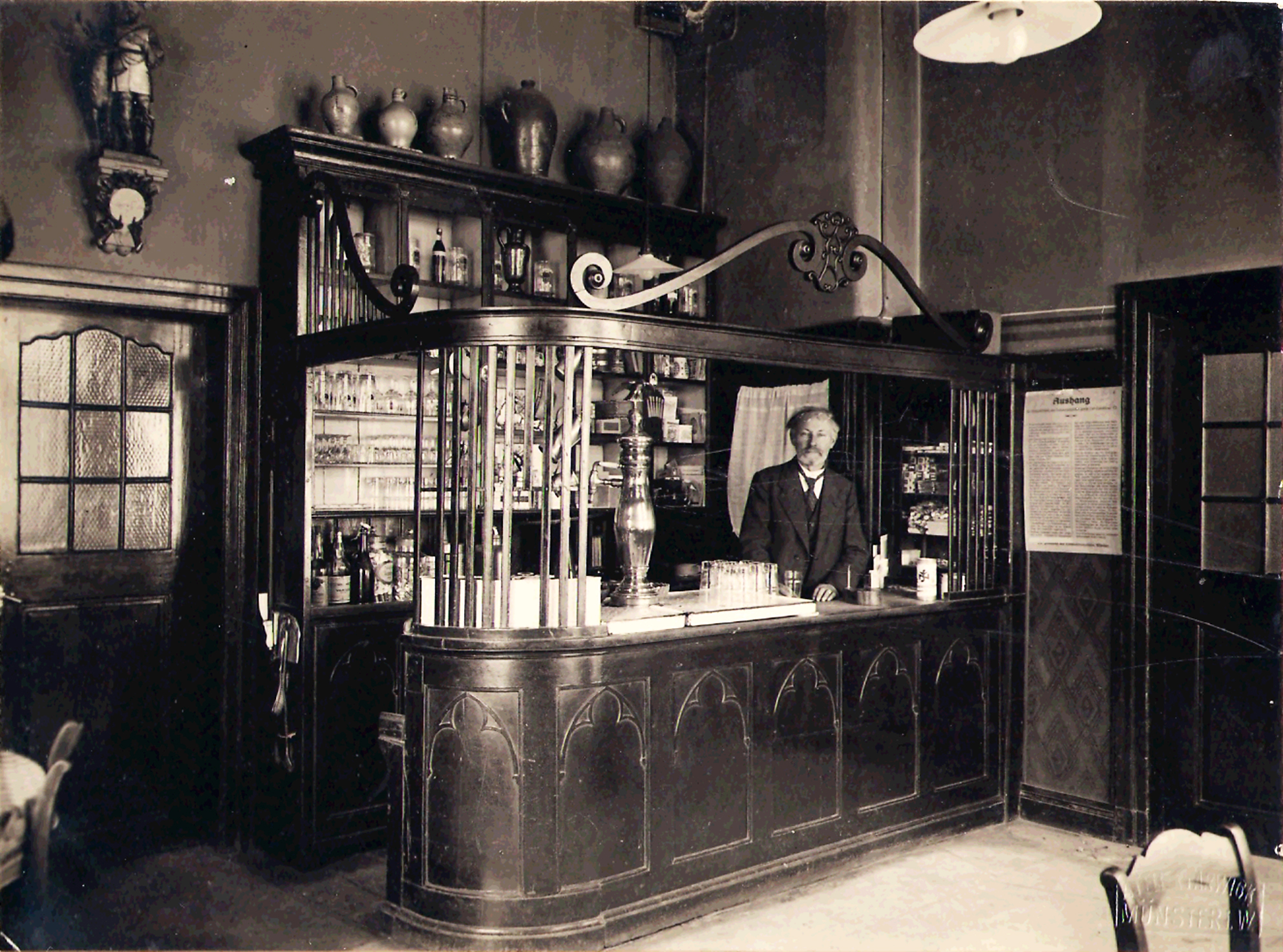 Etwa 1925 hinter dem Tresen seines Gasthauses